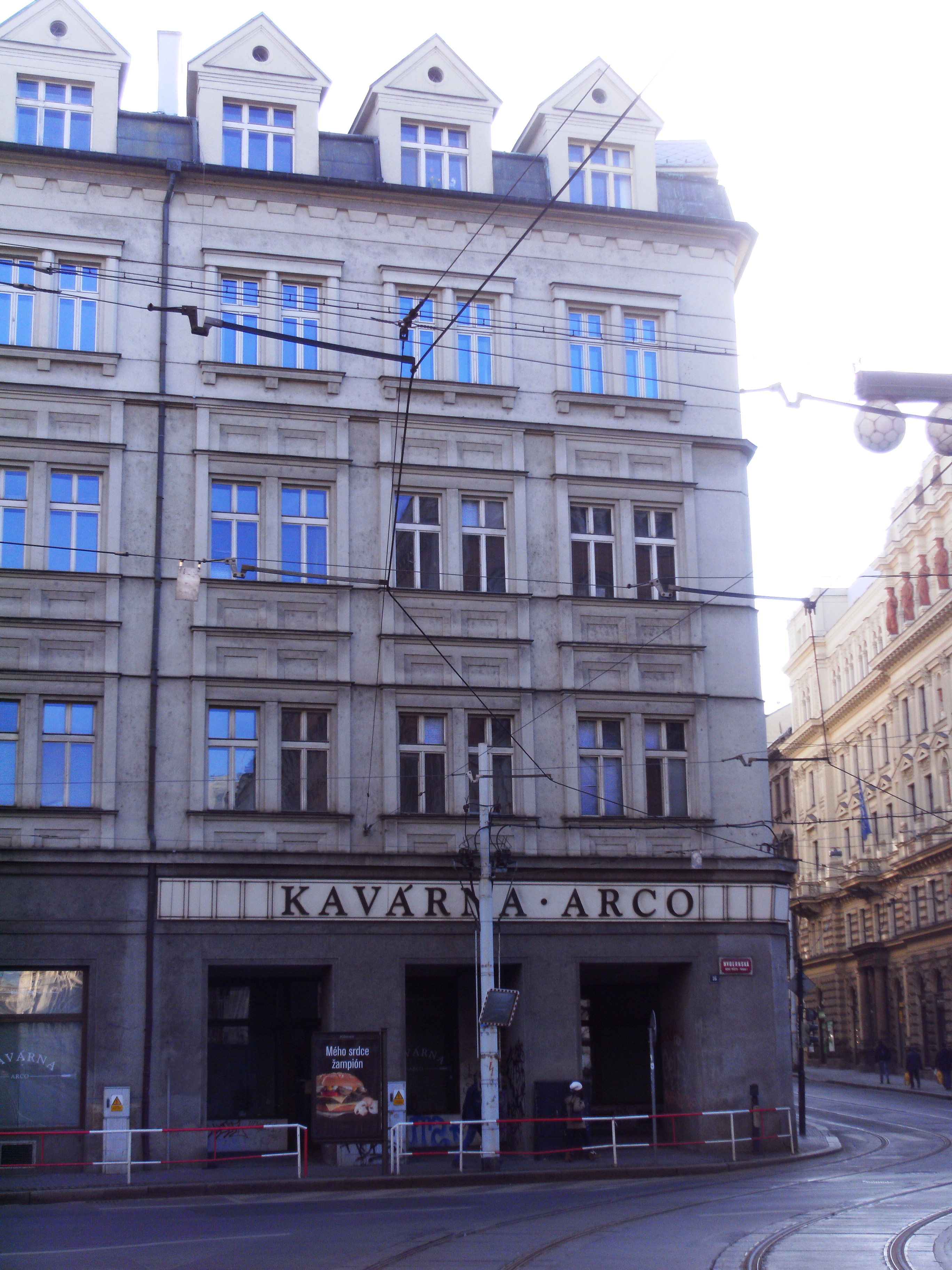 Kavárna Arco u Masarykova nádraží